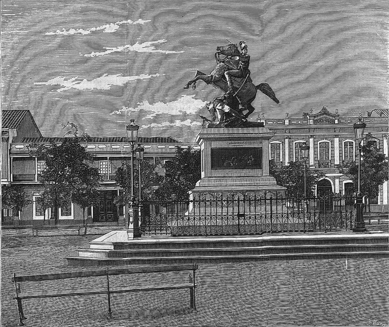 Estatua de Bernardo O´Higgins en la Alameda de Santiago de Chile (1879)